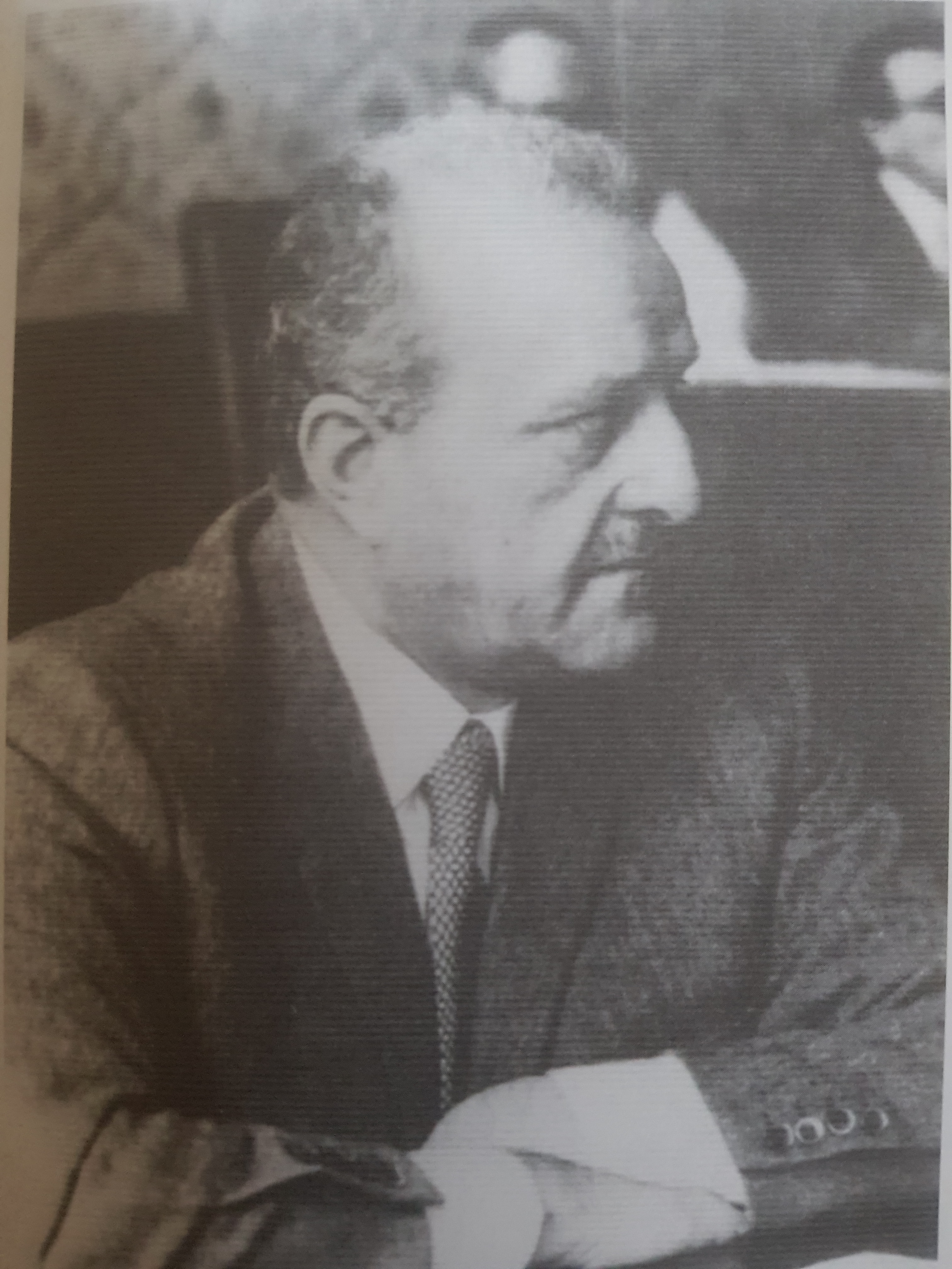 Sindaco di Castelfranco Veneto (1948-1951, 1960-1970)